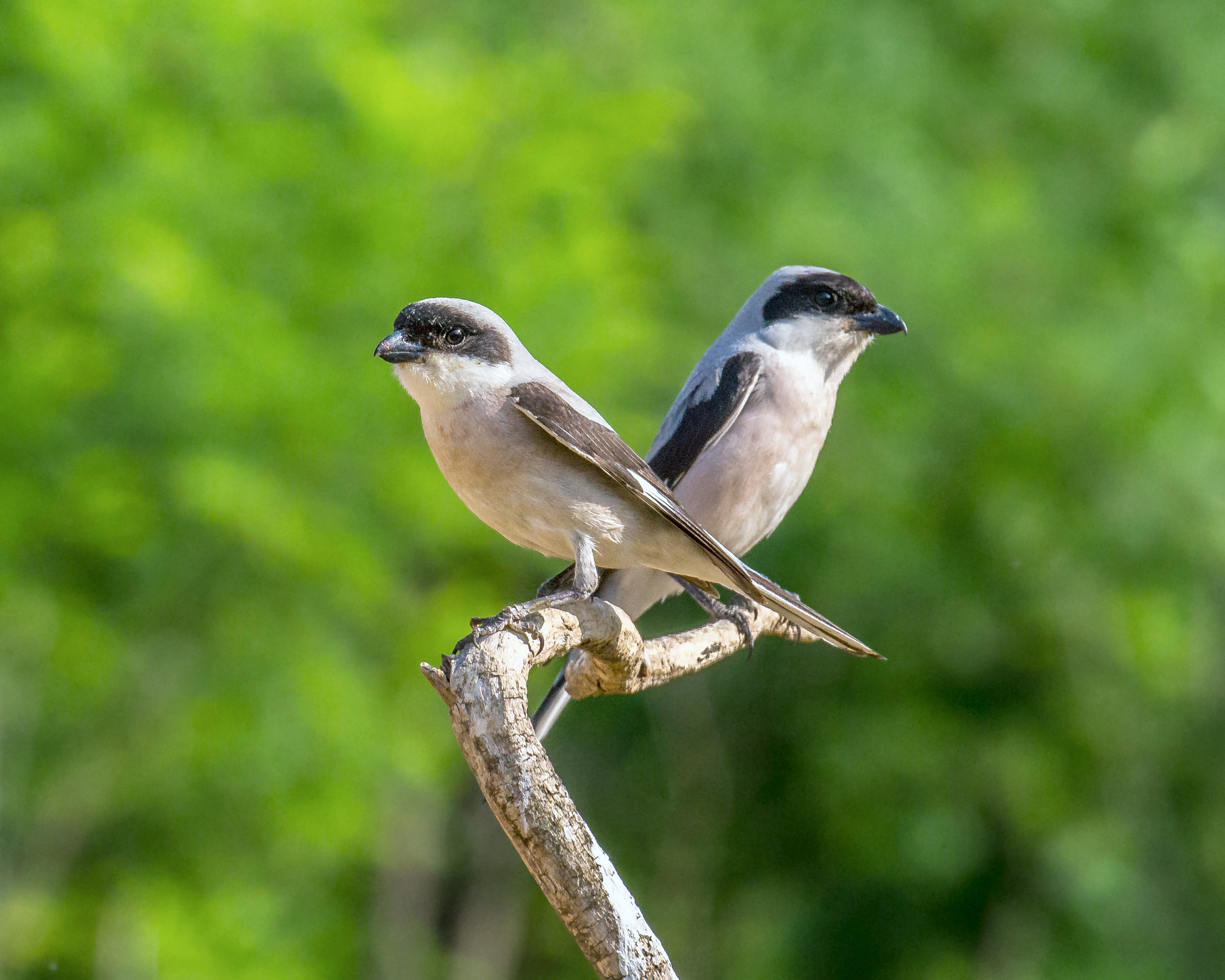 Taken in Hungary.